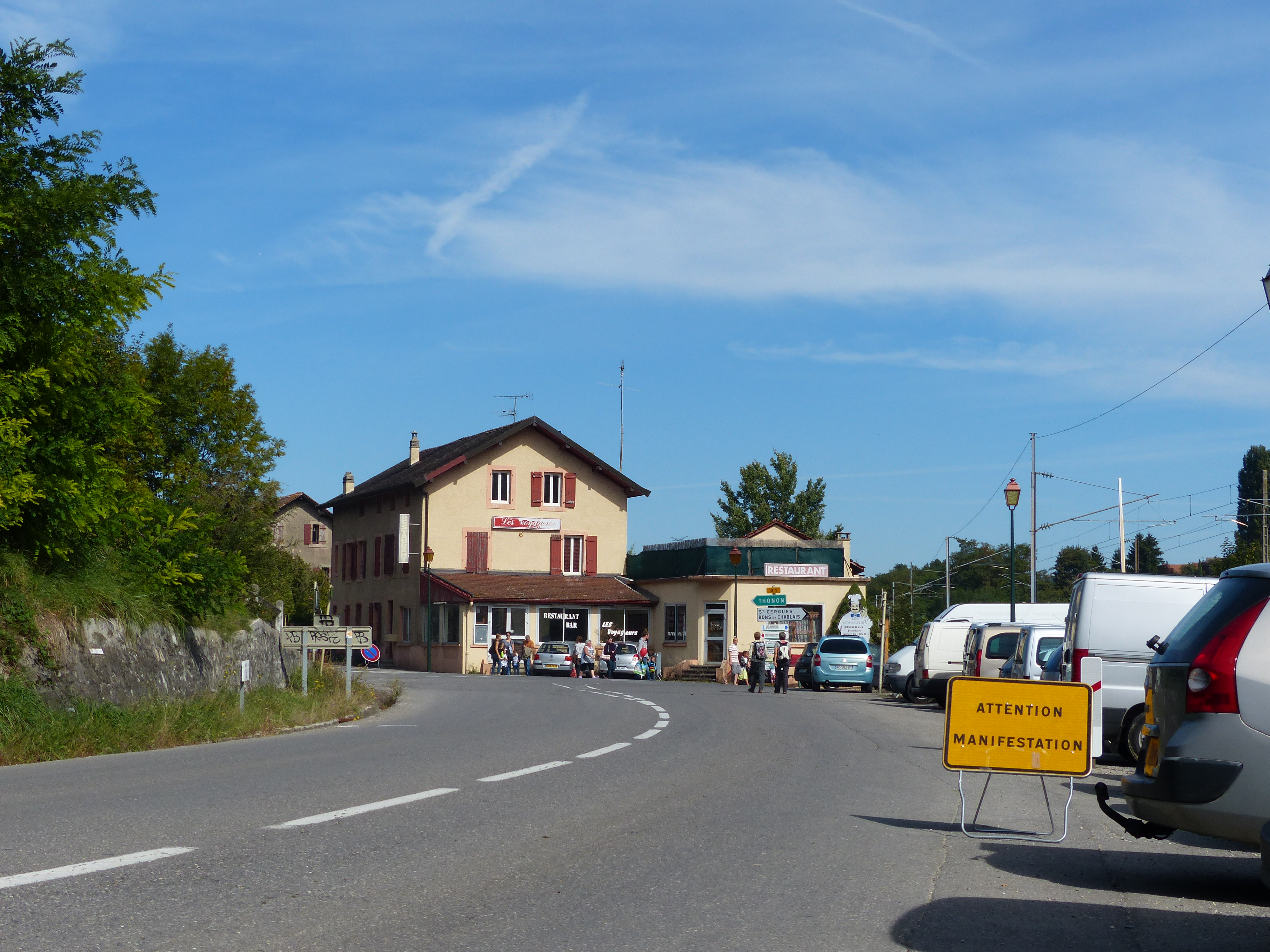 Panneau de manifestion à Machilly pour le festival Couleurs d'Automne 2013